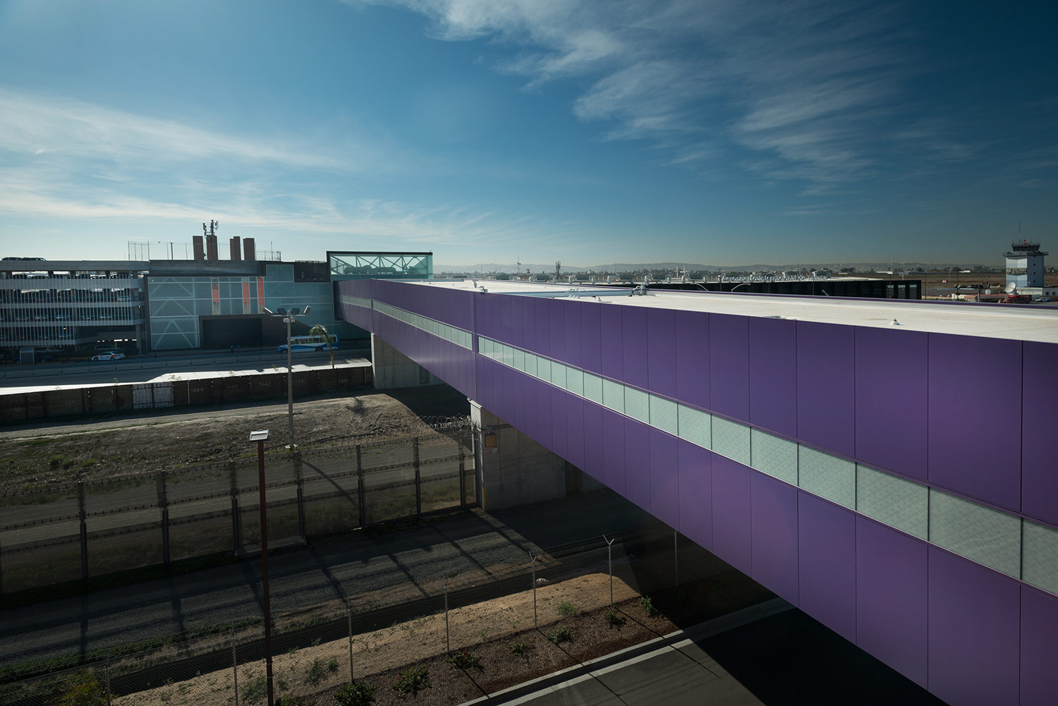 Foto de: Harrison Photograpy